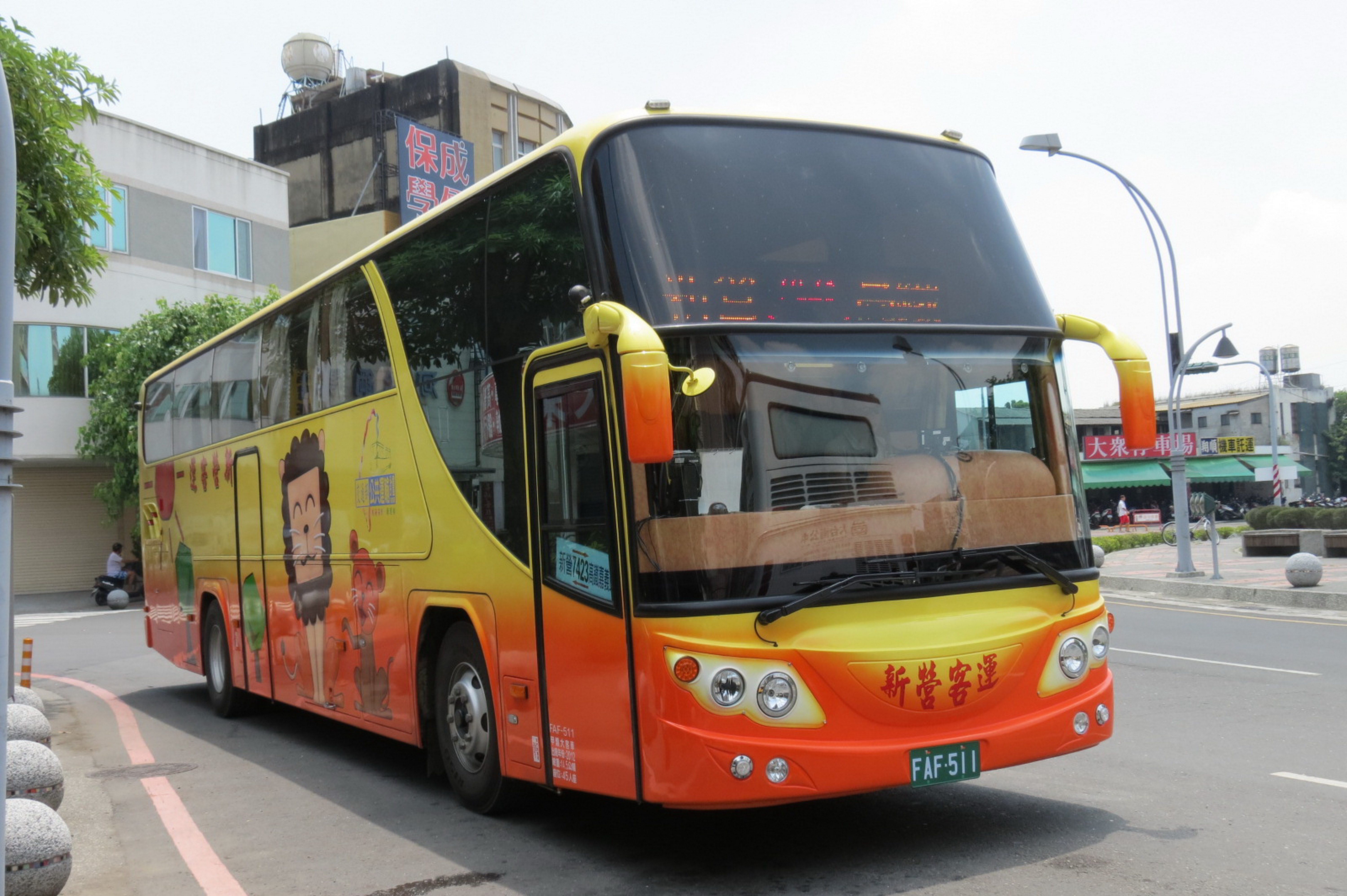 中文（台灣）: 新營客運大客車FAF-511。